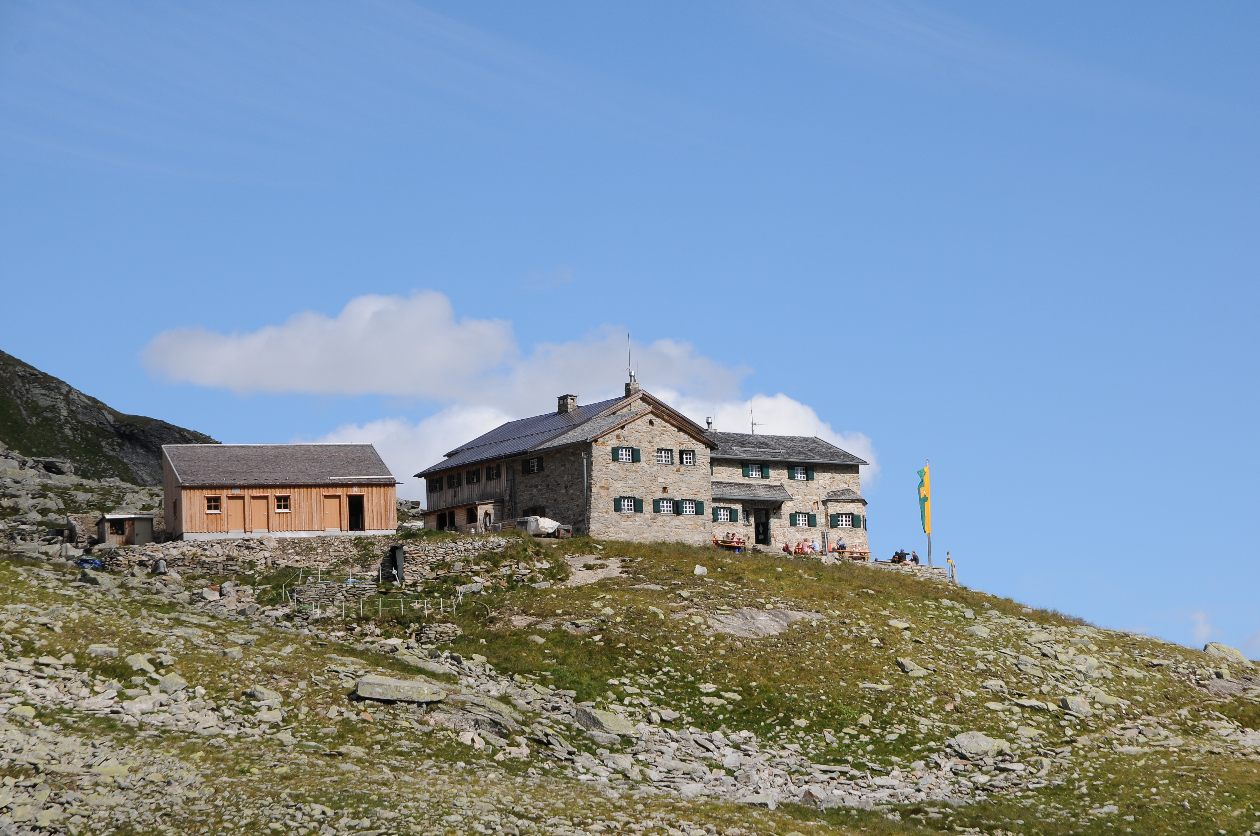 Das Friesenberghaus ist eine Schutzhütte des Deutschen Alpenvereins (DAV) in den Zillertaler Alpen auf einer Höhe von 2498 Metern im österreichischen Bundesland Tirol und gleichzeitig ein Etappenziel des Berliner Höhenweges, der unter anderem auch zur ca. 2 Stunden entfernten Olpererhütte führt.